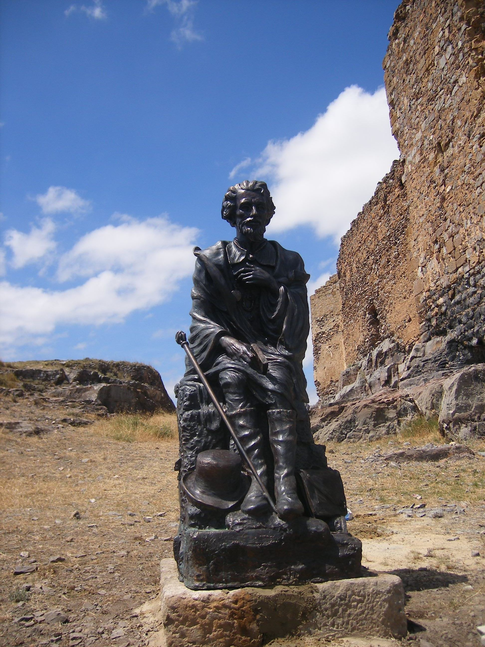 Monumento a Gustavo Adolfo Bécquer colocado en el Moncayo y realizado por Luigi Maráez.